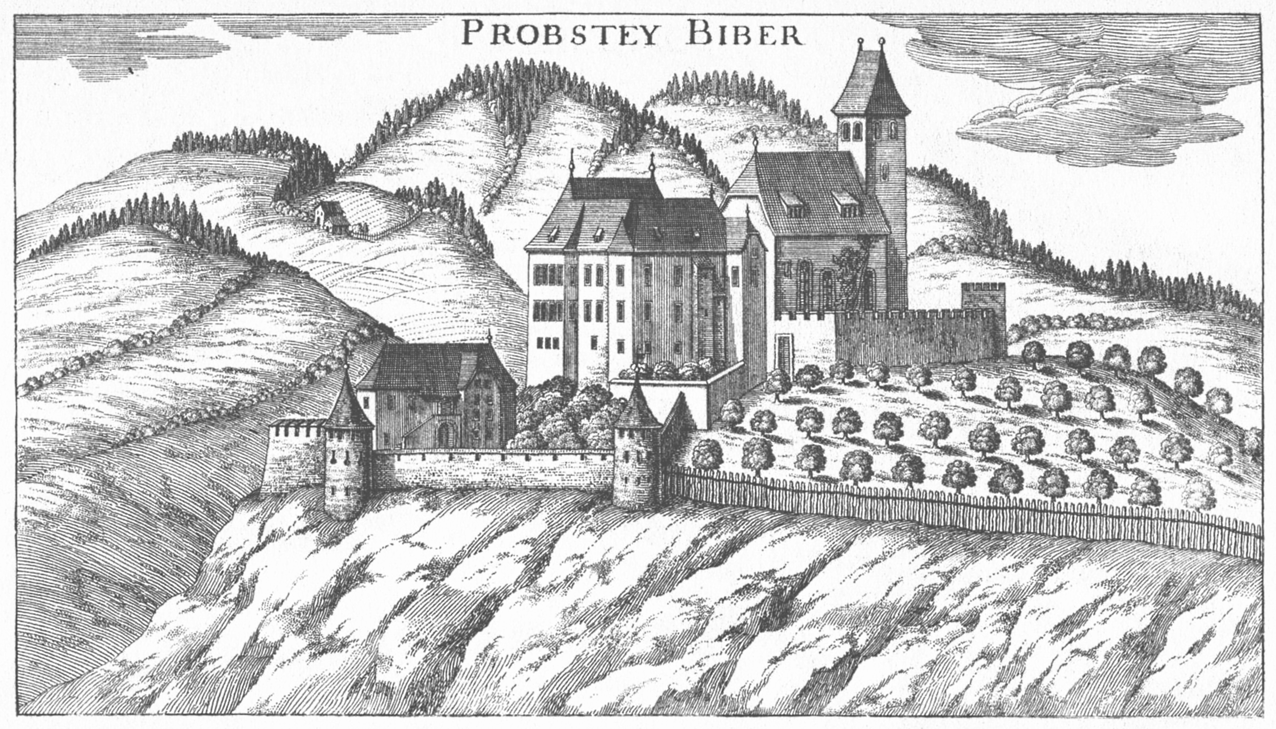 Schloss Piber nach Georg Matthäus Vischer 1681 in Köflach bei Voitsberg, Steiermark